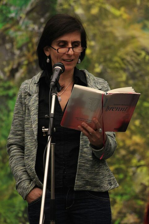 Sudabeh Mohafez liest aus ihrem Roman "brennt"